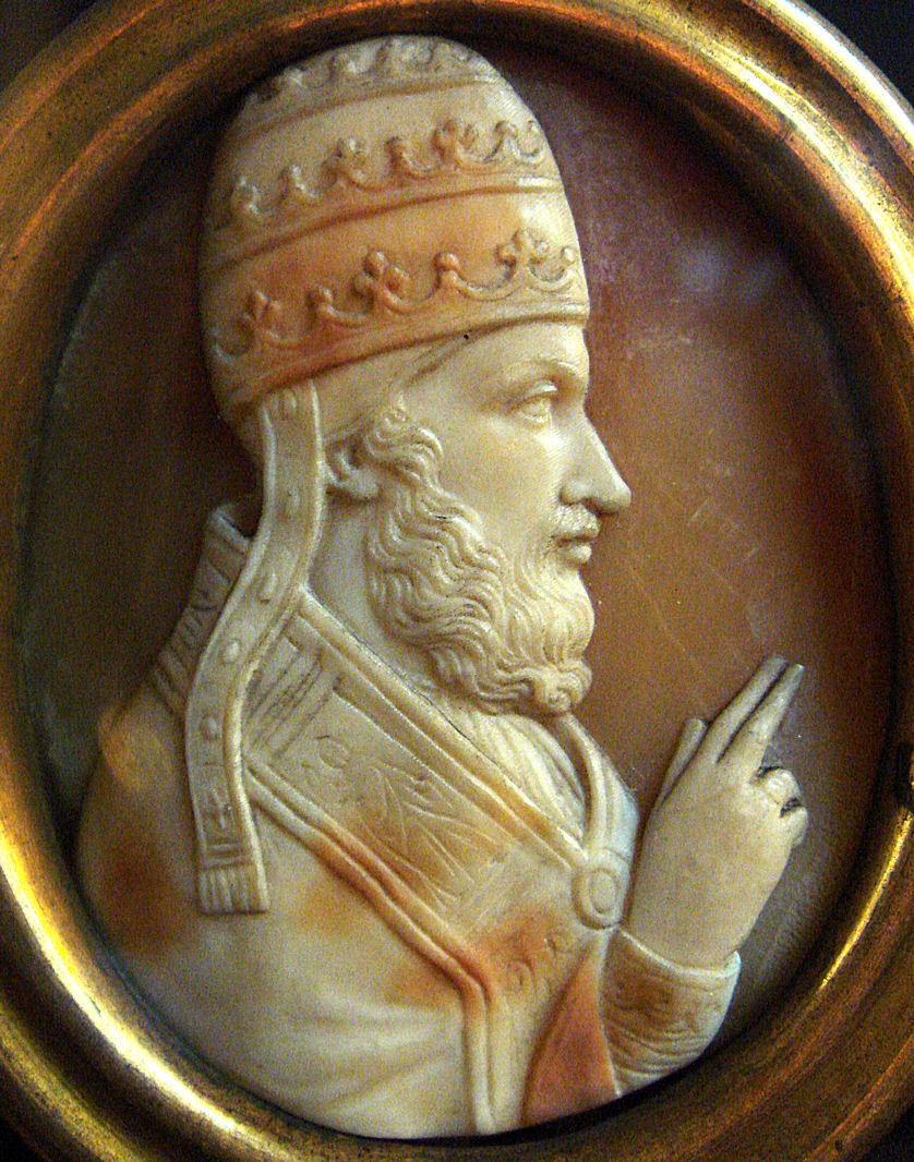 Pope Adrian IV Cameo